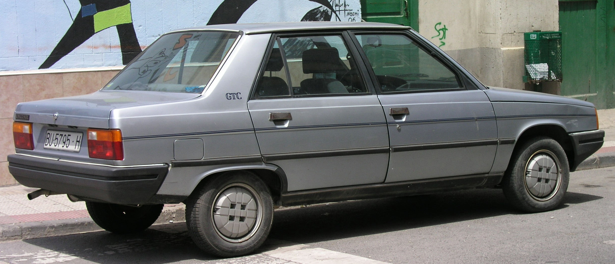 Renault 9 GTC en España. El GTC era un Renault 9 básico "pelado" de equipamiento. "Lo más alemán de Renault" rezaba alguna publicación de la época. El Renault 9 como vehículo espacioso, robusto y elegante. La versión GTC nació con el objetivo de ajustar el precio del vehículo para ampliar su radio de ventas, ofreciendo por un precio más asequible este modelo de gran elegancia y fiabilidad. Para ello, Renault redujo al máximo el equipamiento, por lo que el GTC carecía de todo tipo de detalles -ni siquiera tenía reloj- y los acabados -aunque buenos para el gusto de principios de los 80- eran un poco inferiores respecto a sus inmediatos hermanos superiores, los Renault 9 GTL. Como propulsor, Renault no se complicó y dotó al 9 GTC con su propulsor de 1237 cc y 55CV, que aunque escaso para su peso era de probadísima fiabilidad y robustez ideal para el tipo de comprador de este modelo. Además, con la caja de cambios de 4 velocidades hacía llegar a este modelo a circular a una velocidad de crucero de 140 km/h sin ningún problema y con un consumo bastante ajustado. Las siglas GTC se aplicaron también en su primo cercano Renault 11, con carrocería de 3 puertas y análogo equipamiento, aunque con menos éxito comercial.